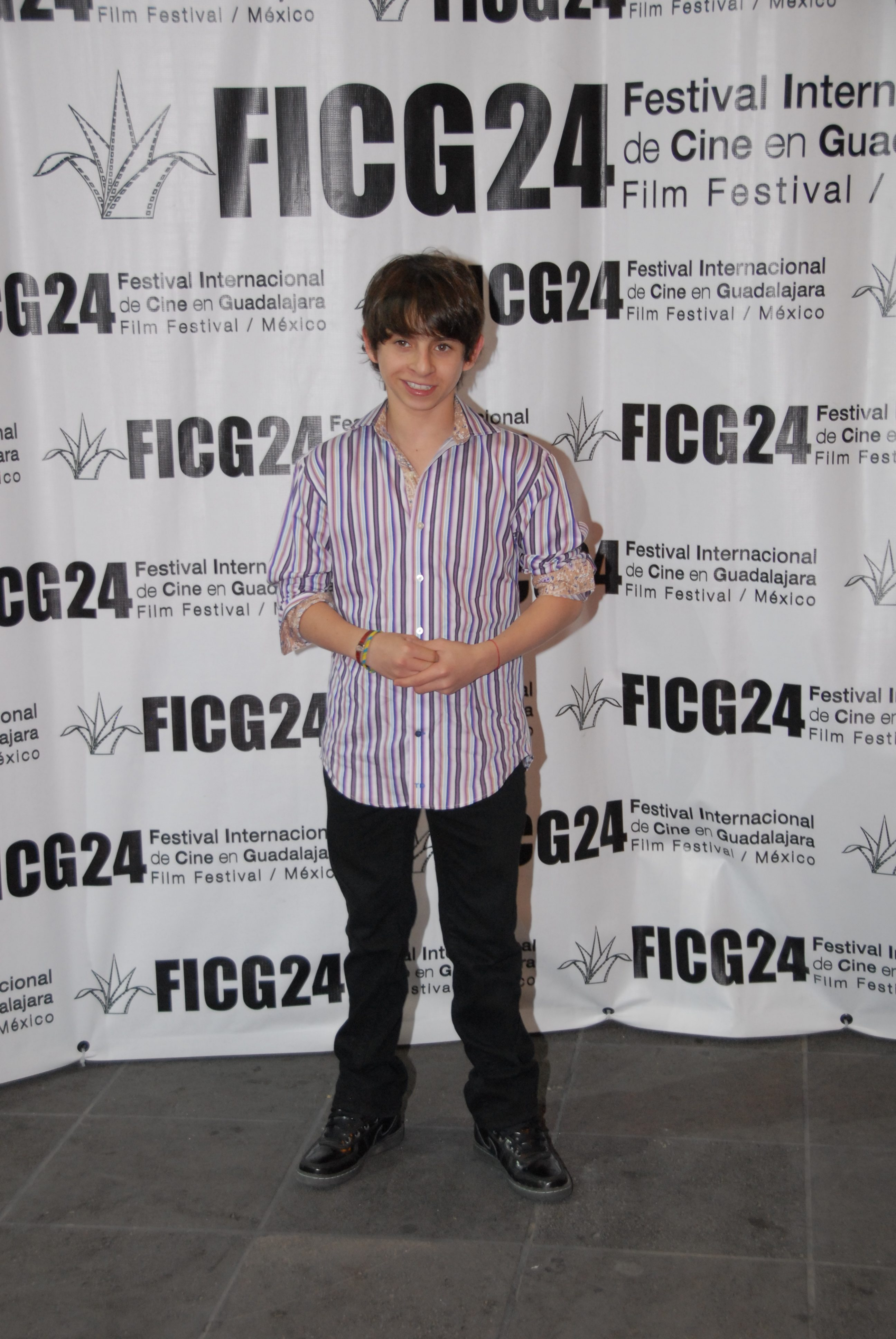 21/03/09 El actor colombiano Moises Arias en la alfombra roja previa a la proyecci�n de la pel�cula The Perfect Game